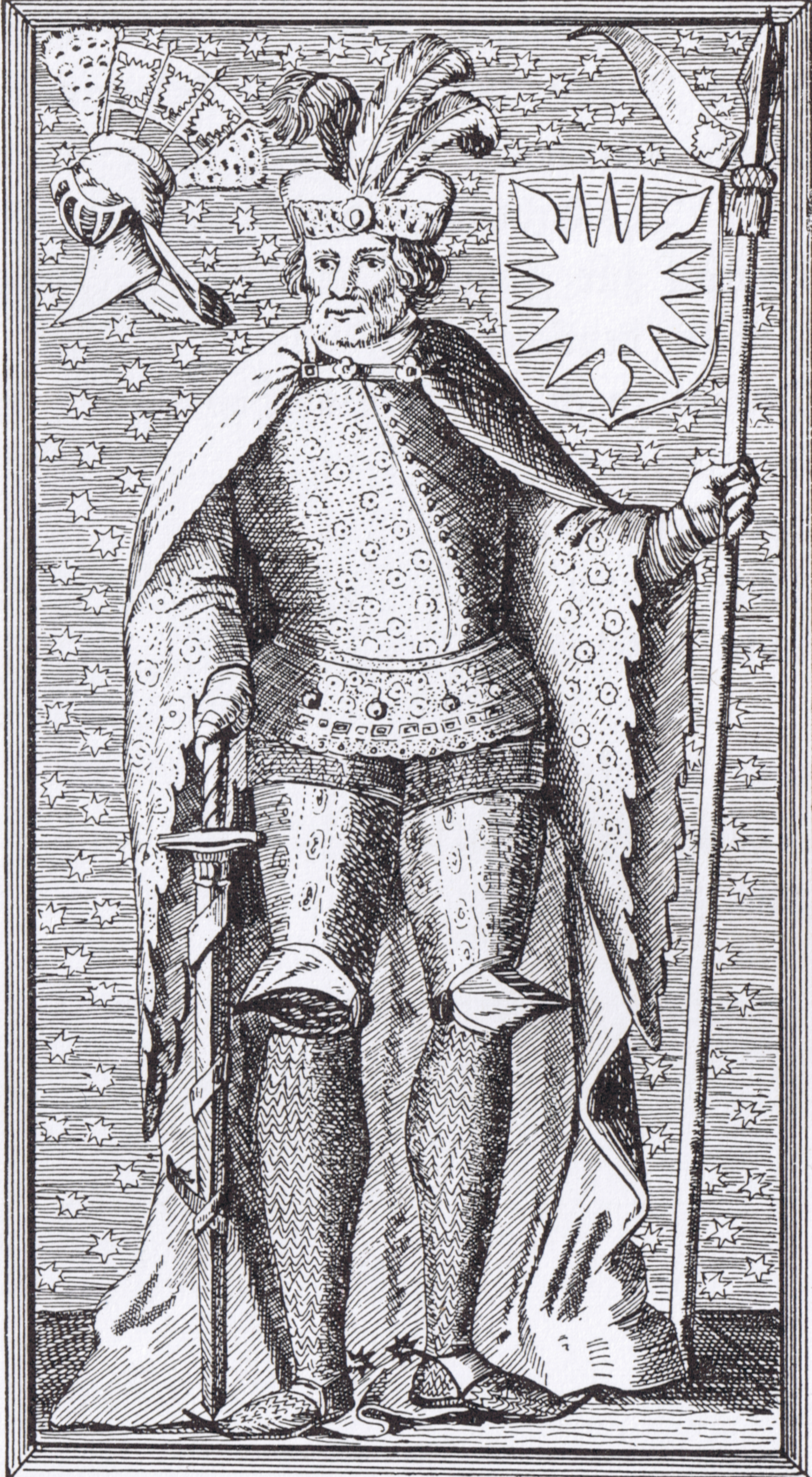 Adolf IV von Schauenburg (* vor 1205, †1261) war Graf von Schauenburg (1225–1238) und Holstein (1227–1238).